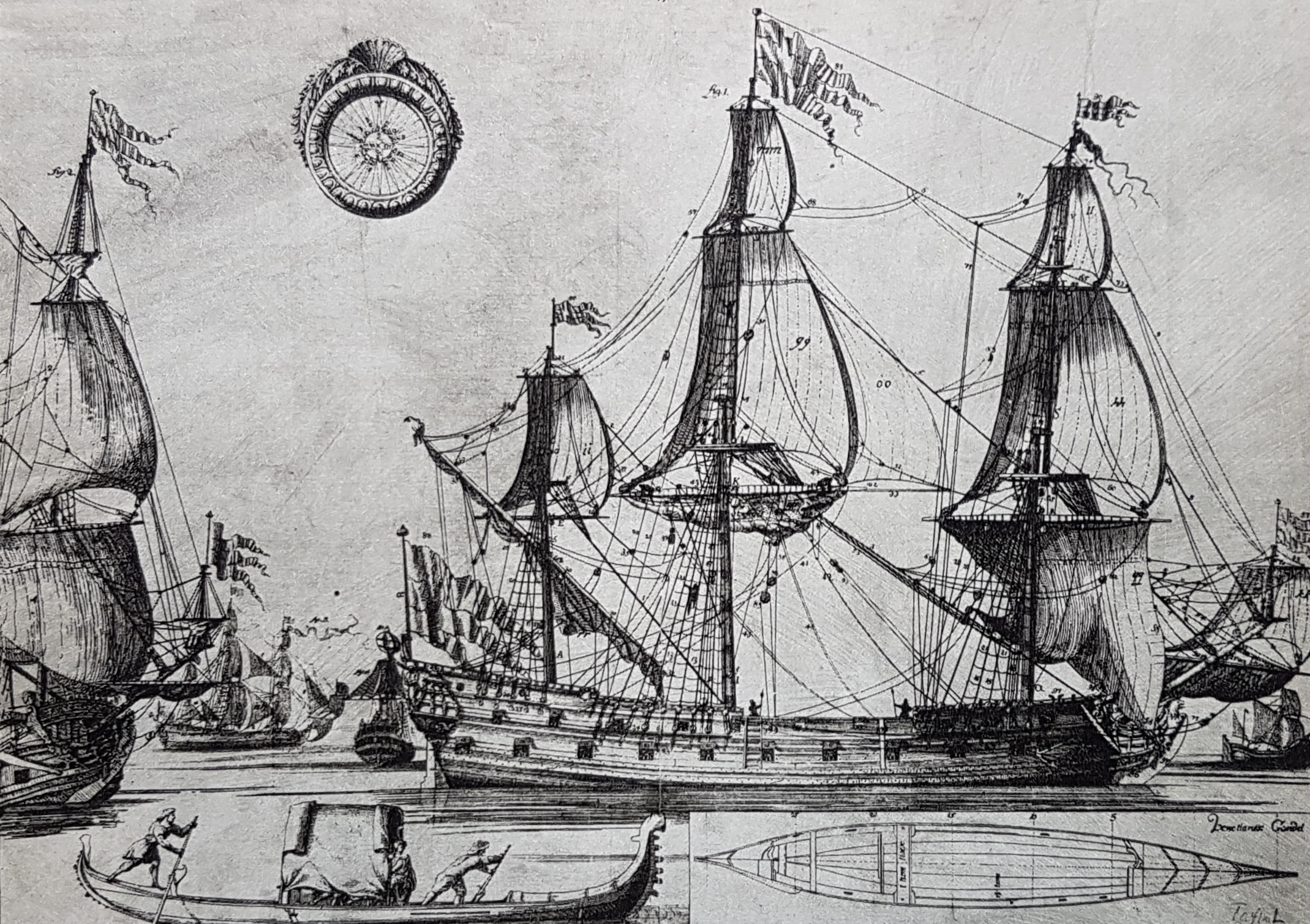 Skeps Byggerij tecknat 1691 av Åke Claesson Rålamb, avfotograferad bild från Allhems Svenskt konstnärslexikon.